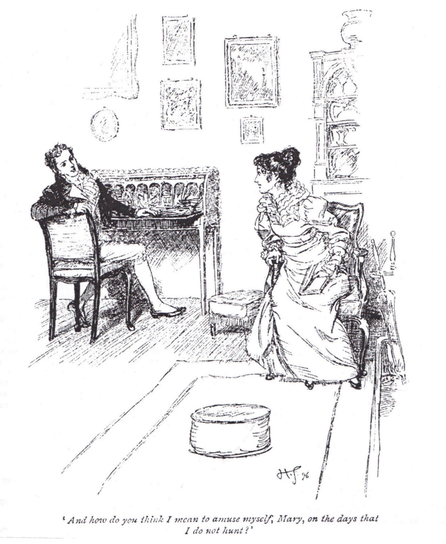 Mansfield Park (Jane Austen), ch 22 : Henry Crawford annonce à sa soeur Mary, qu'il veut séduire Fanny Price